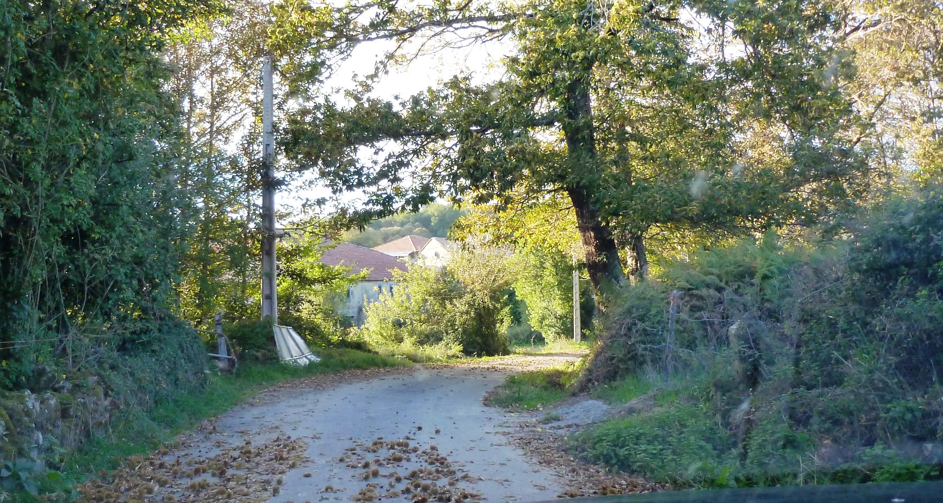 Quintela, Aguada, Carballedo